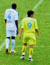 Le cong vinh